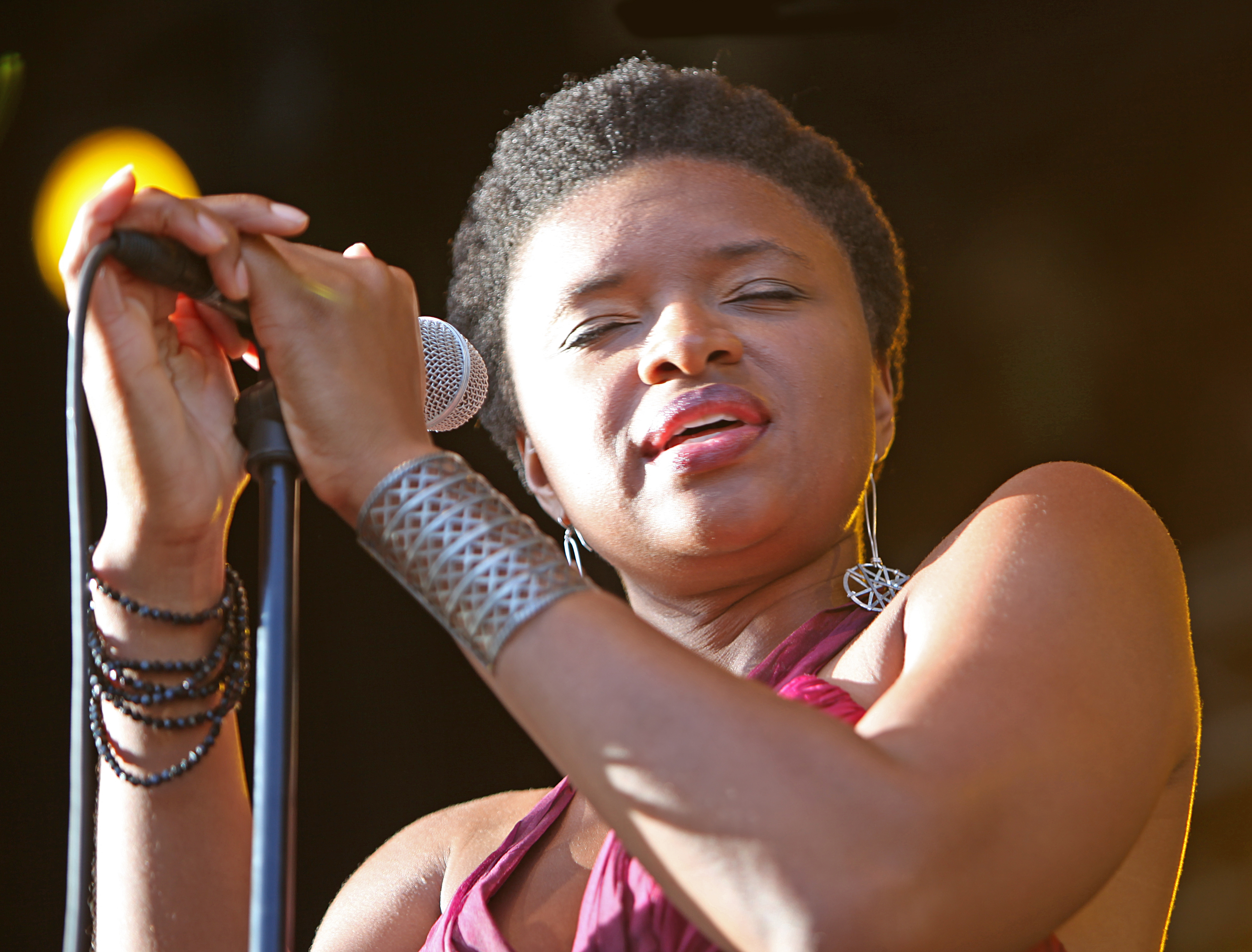 Lizz Wright at Stockholm Jazz Fest 2009